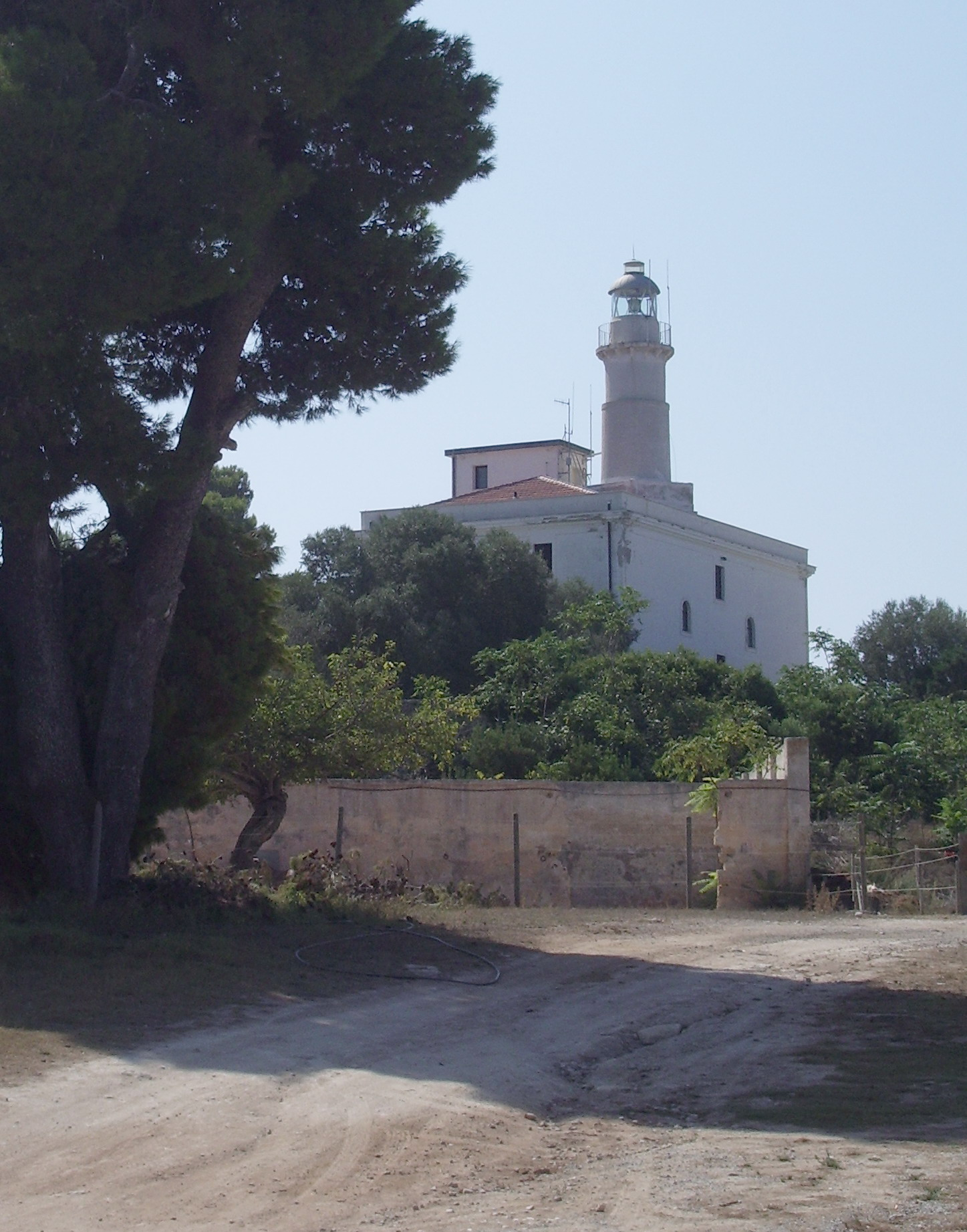 Il Faro di Pianosa (LI)